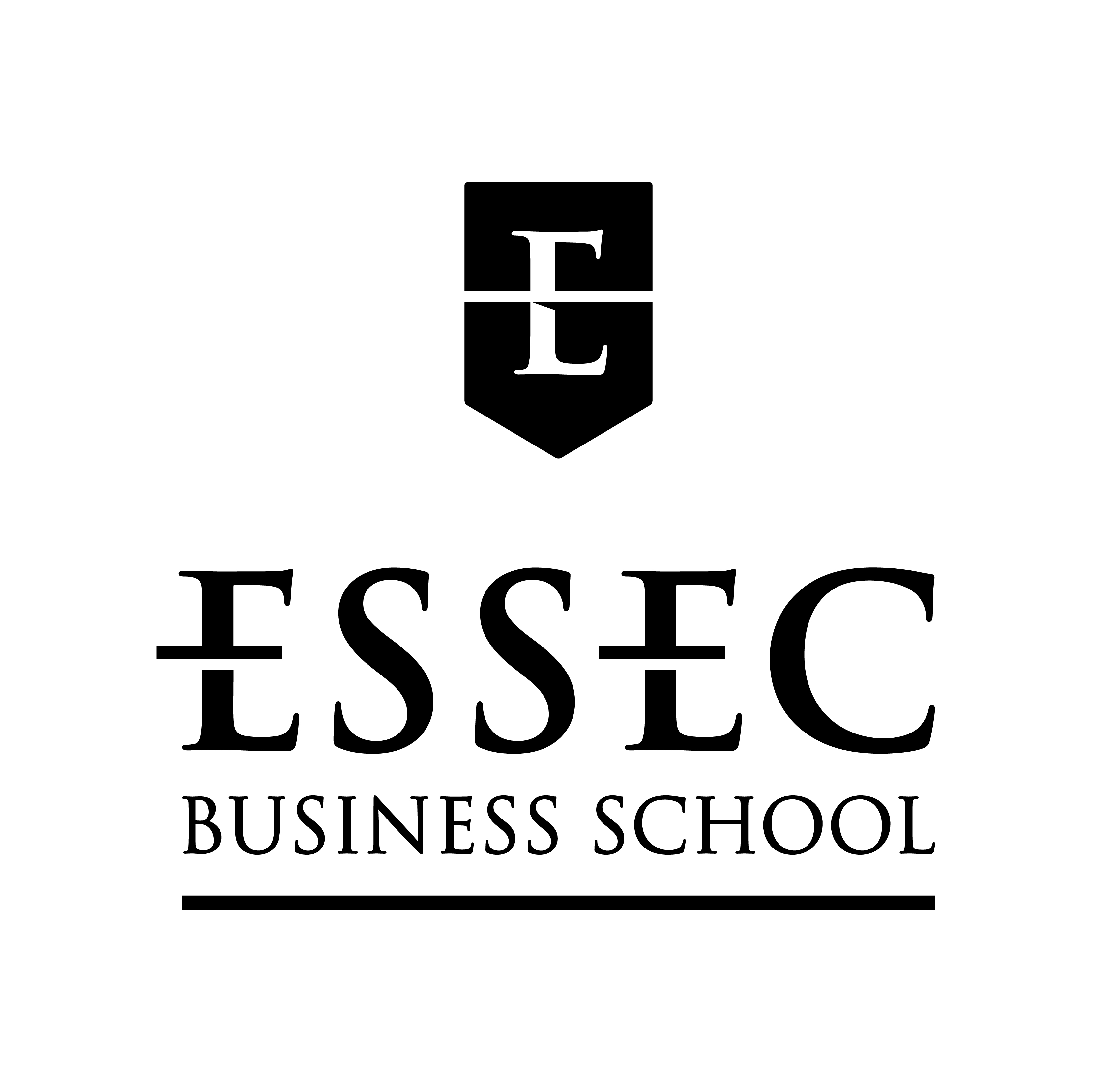 logo